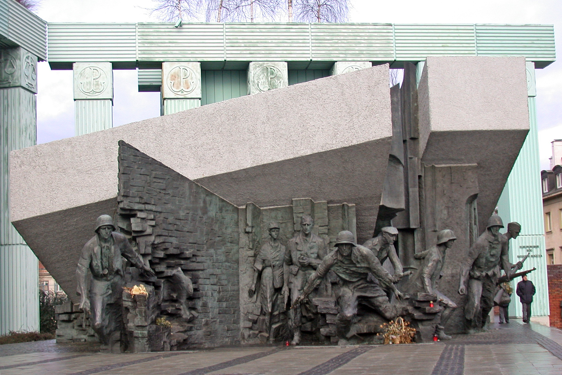 Varsavia, Piazza Krasińskich (Plac Krasińskich), monumento alla Rivolta di Varsavia del 1944 (Pomnik Powstania Warsawkiego 1944).